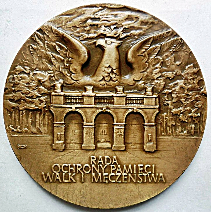 Medal pamiątkowy Rady Ochrony Pamięci Walk i Męczeństwa